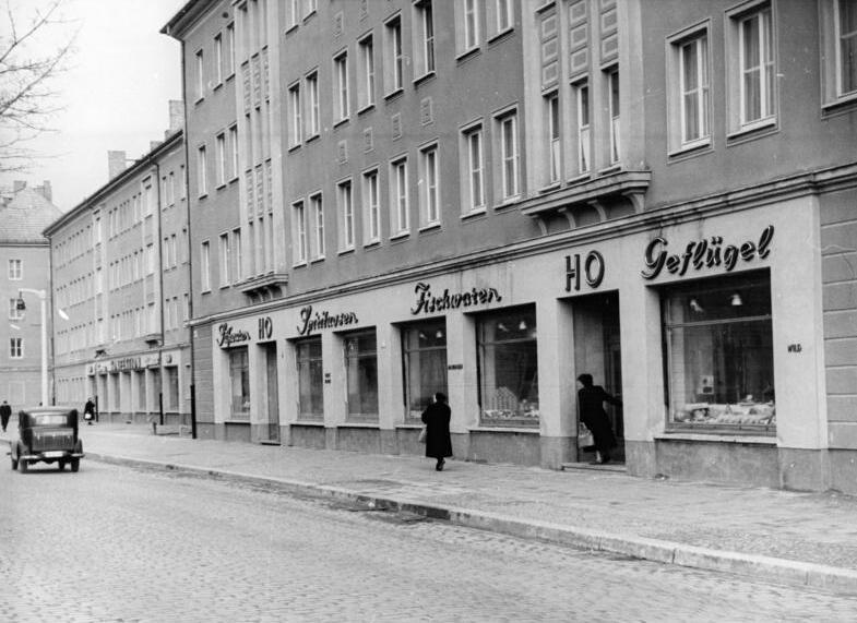 Berlin, Sterndamm, HO-Verkaufsstelle ADN-ZB Krueger Ro-Schm 24.1.1956 Neue HO-Verkaufsstelle am Sterndamm in Berlin-Johannistal In den Neubauten am Sterndamm in Berlin-Johannistal werden am 25.1.1956 einige neue HO-Verkaufsstellen eröffnet. Zur besseren Versorgung der Bevölkerung dieser Gegend werden ein Fleischwaren-, ein Obst- und Gemüse-, ein Backwaren- und ein Lebensmittelgeschäft beitragen. UBz: Aussenansicht der neuen HO-Verkaufsstellen am Sterndamm.